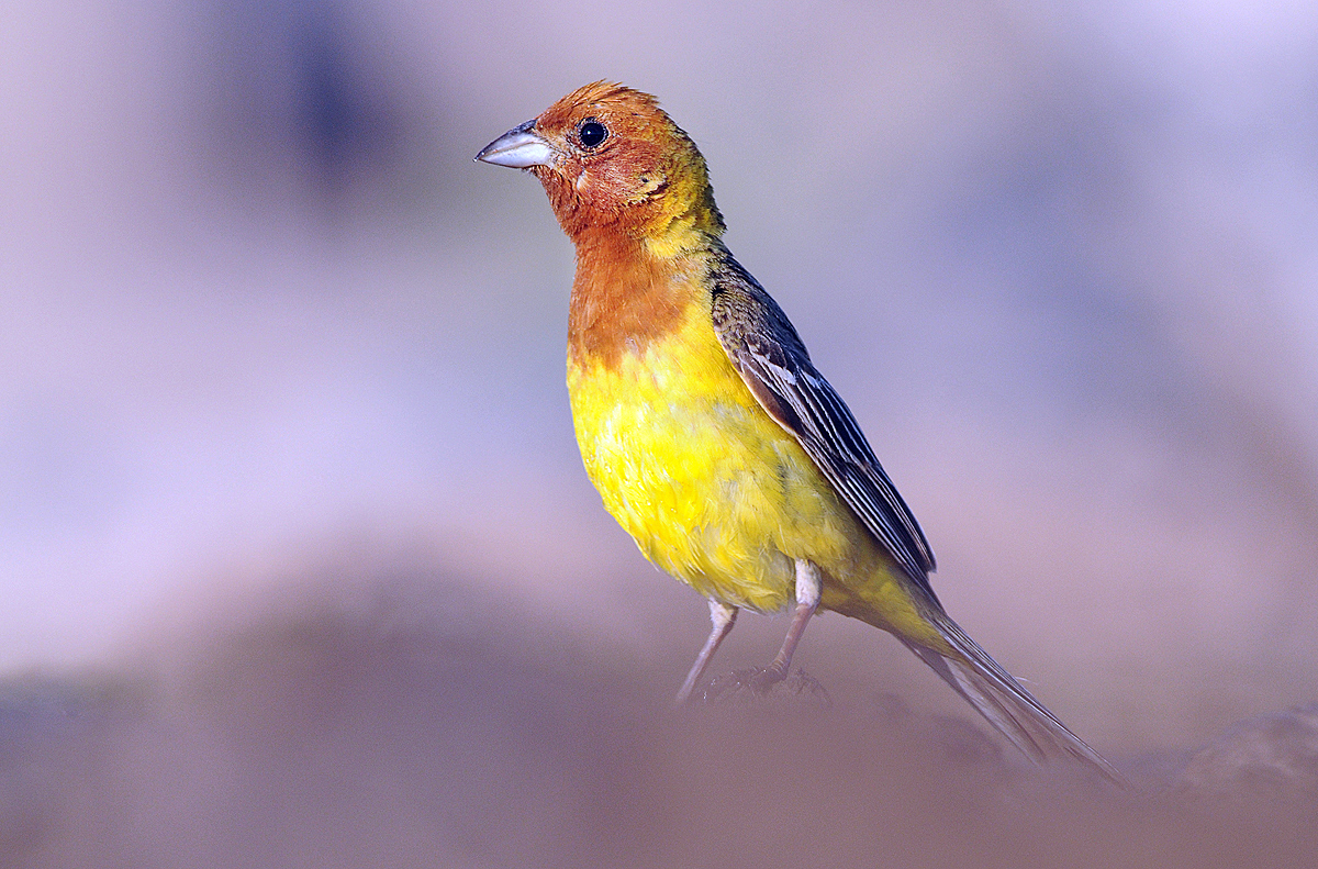 Emberiza bruniceps Strnádka ryšavohlavá Kolshengel